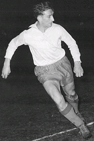 Title: FDGB-Pokal, Dynamo Berlin - Fortschritt Meerane 6:2 Factual corrections and alternative descriptions are encouraged separately from the original description. Additionally errors can be reported at this page to inform the Bundesarchiv. Original historic description: Zentralbild-Beyer Bey-Noa 18.11.1956 Dynamo blieb im FDGB-Pokal - Am Sonnabend, dem 17.11.1956, standen sich in einem FDGB-Pokalspiel unter Flutlicht im Stadion Busch-Allee die beiden Mannschaften von Dynamo Berlin und Fortschritt Meerane gegenüber. Dynamo siegte klar mit 6:2. UBz: Der Dynamo-Mittelstürmer Hänsicke (rechts) ist durchgebrochen. Vergeblich eilt ihm der Meeraner-Verteidiger Wohlfahrt (links) nach.